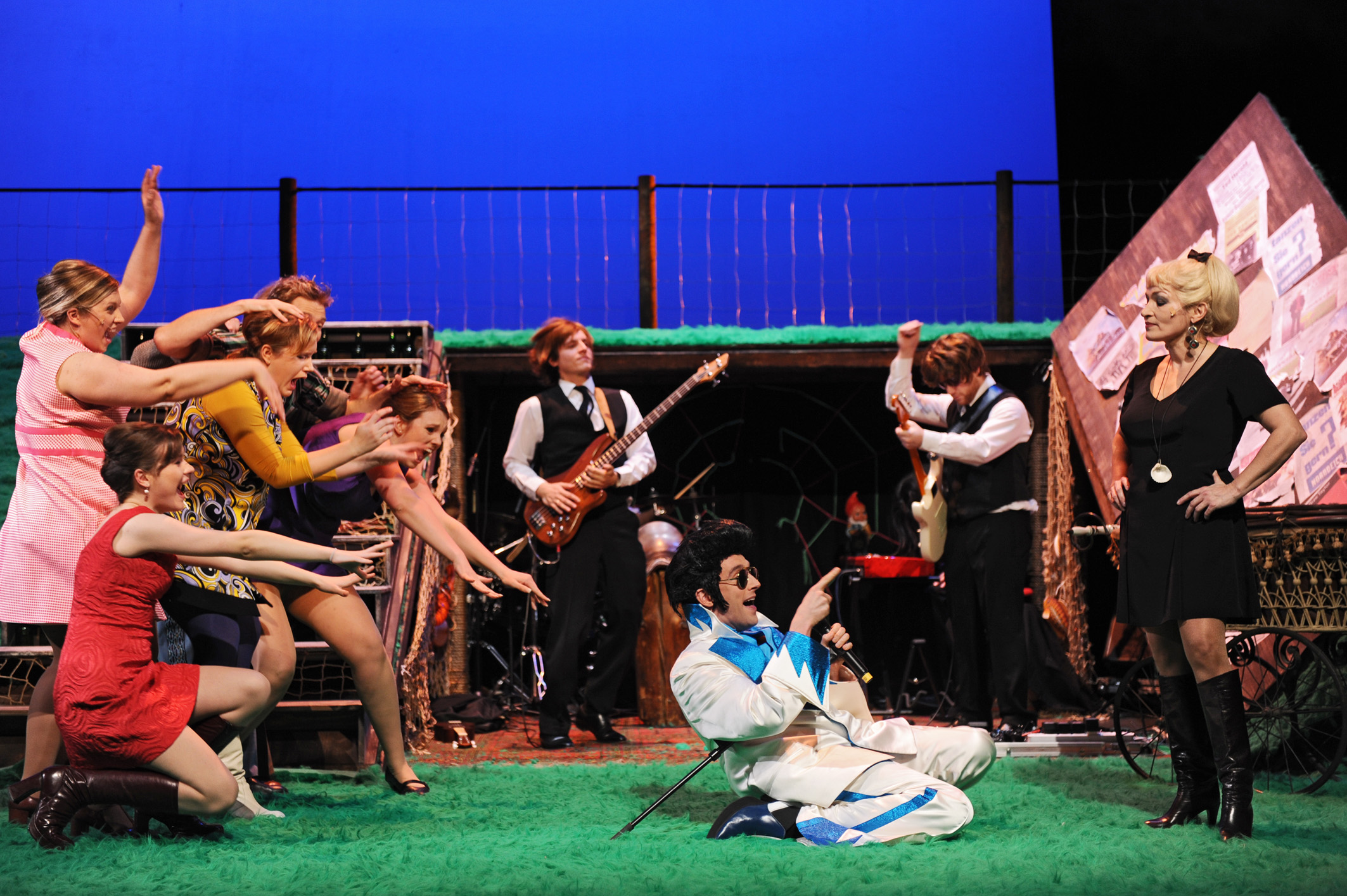 Musical "Meta, Norddeich" Landesbühne Niedersachsen Nord